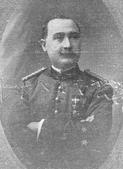 Orencio Arosa Álvarez, fotografía en Vida Gallega 1923